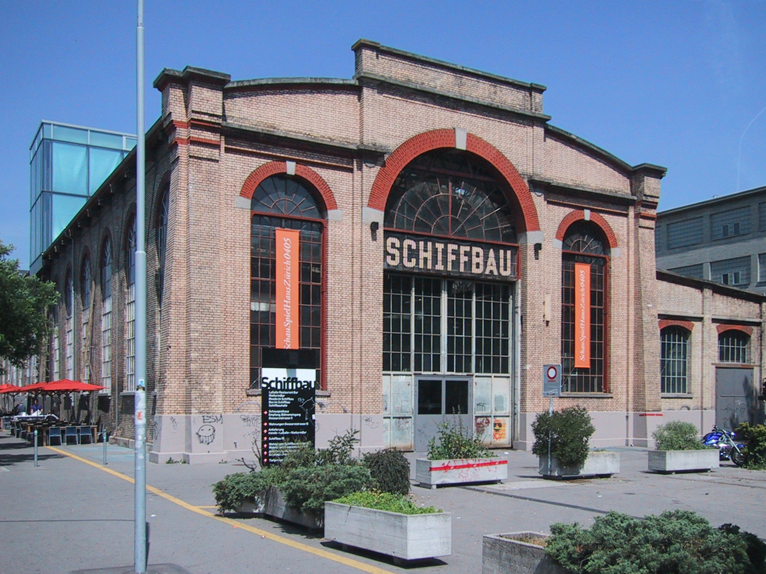 Aufnahme 2. Juni 2005, Schiffbau in Zürich, Kreis 5, Quartier Escher Wyss. Fotograf Peter Berger (selbst fotografiert). Lizenzstatus "GNU-FDL"